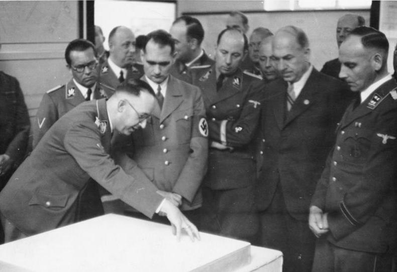 Berlin, Ausstellung "Planung und Aufbau im Osten" Ausstellung in Berlin, 1941 Planung u. Aufbau im Osten, Besichtigung durch Rudolf Hess Fotograf: Zeymer [Berlin.- Ausstellung "Planung und Aufbau im Osten", Besichtigung durch Rudolf Heß und Heinrich Himmler; hinter Himmler: Philipp Bouhler, hinter Heß verdeckt: Kurt Daluege; 1.v.r.: Konrad Meyer Abgebildete Personen: Heß, Rudolf: Stellvertreter Hitlers als Führer der NSDAP, Kanzleileiter, Deutschland (GND 11855039X) Himmler, Heinrich: Reichsführer der SS, Deutschland (GND 11855123X) Bouhler, Philipp: Reichsleiter, Beauftragter für das Euthanasie-Programm, Deutschland (GND 11627266x) Daluege, Kurt Max Franz: Polizeigeneral, SS-Gruppenführer, 1946 in Prag hingerichtet, Deutschland Meyer, Konrad Prof.: Arbeitsgemeinschaft der Landwirtschaftswissenschaften, Deutschland